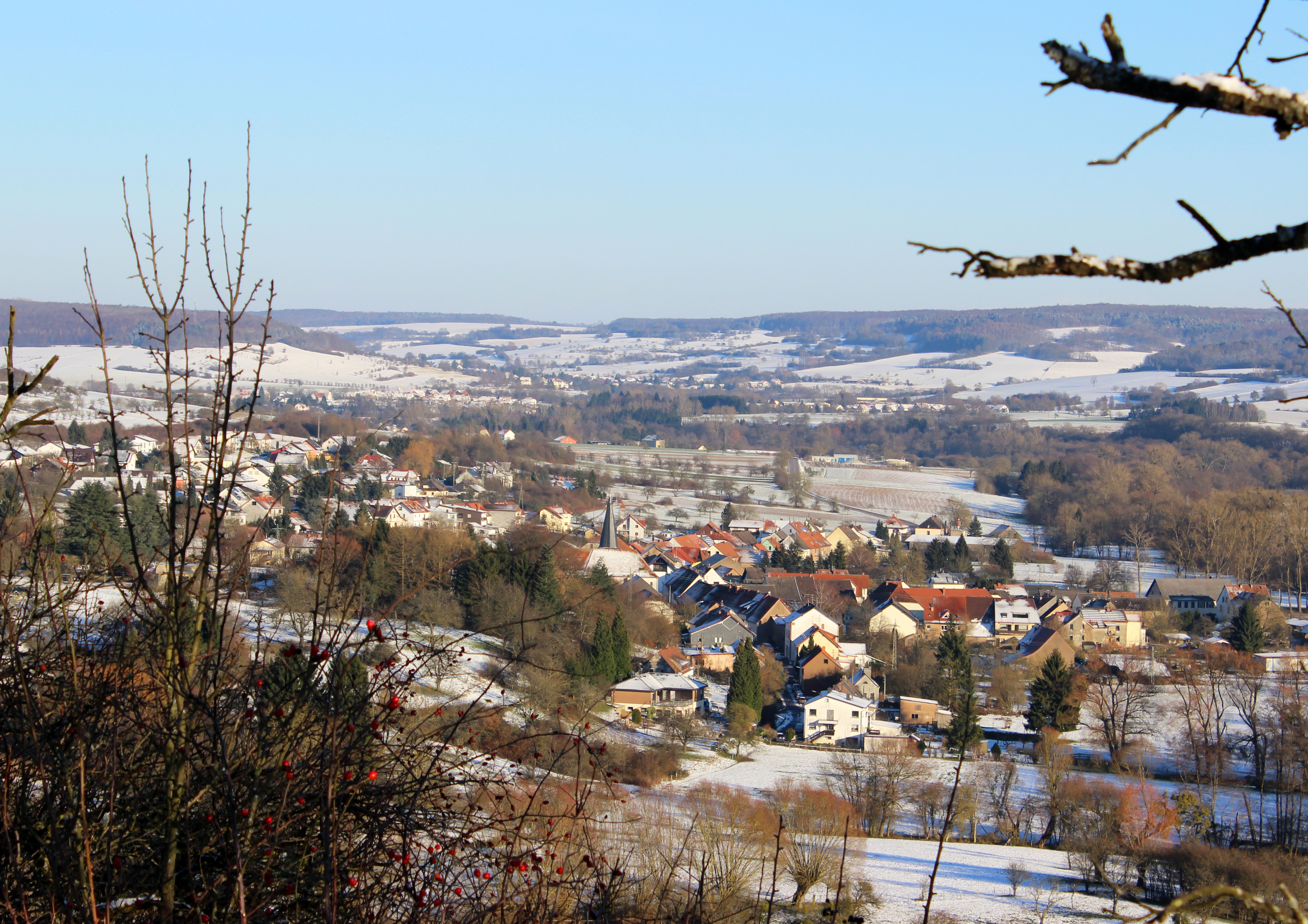 Blick aus südwestlicher Richtung über Reinheim in Richtung Gersheim